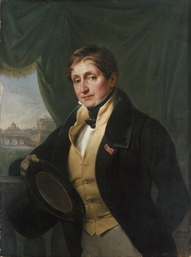 Jean-Gabriel Eynard (1775-1863)